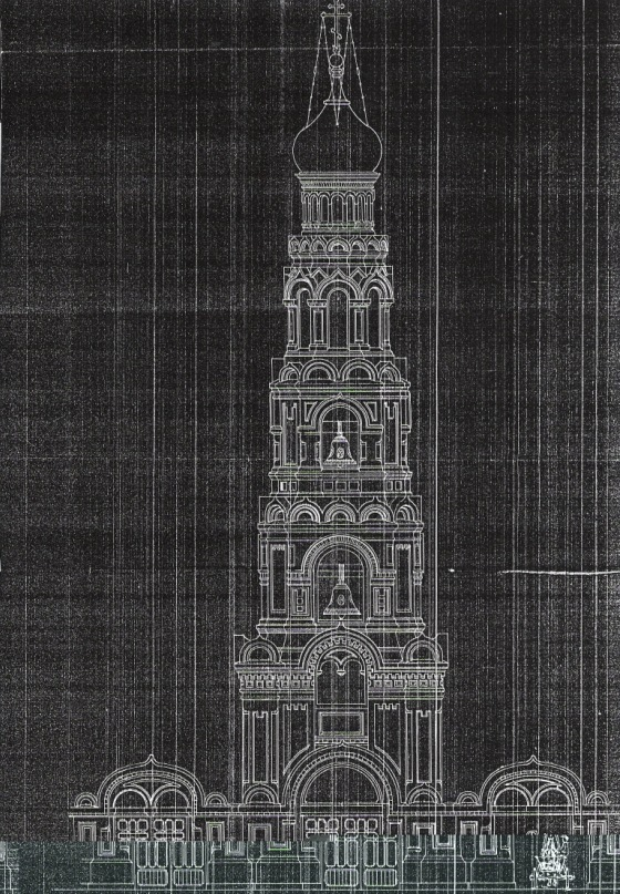 Схема колокольни Бугульминского Александро-Невского монастыря